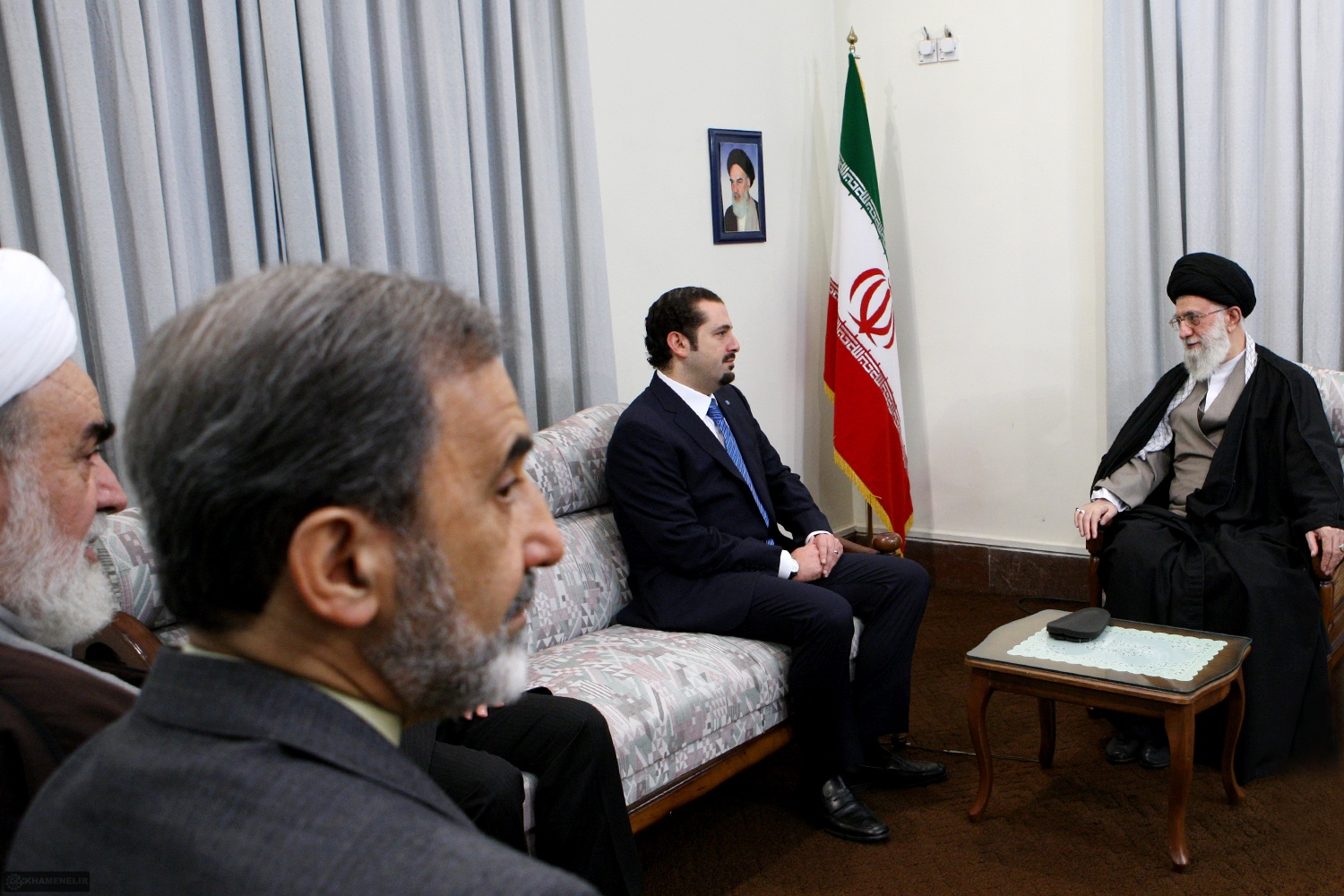 دیدار سعد حریری نخست وزیر لبنان با سید علی خامنه‌ای رهبر ایران